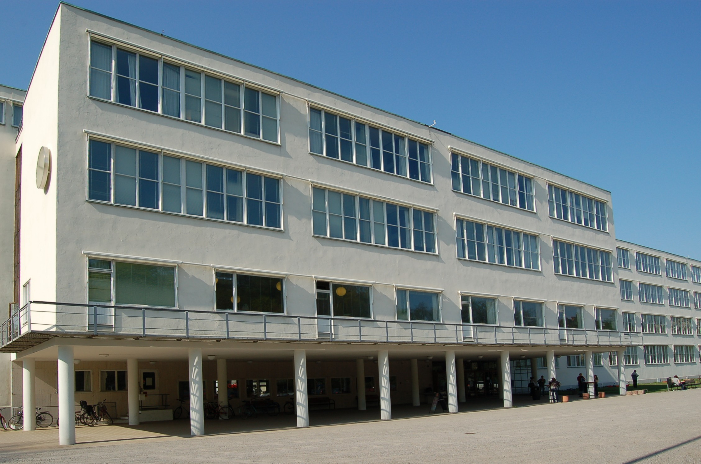 Byggnaden för f.d. Sveaplans gymnasium, numera Socialhögskolan i Stockholm